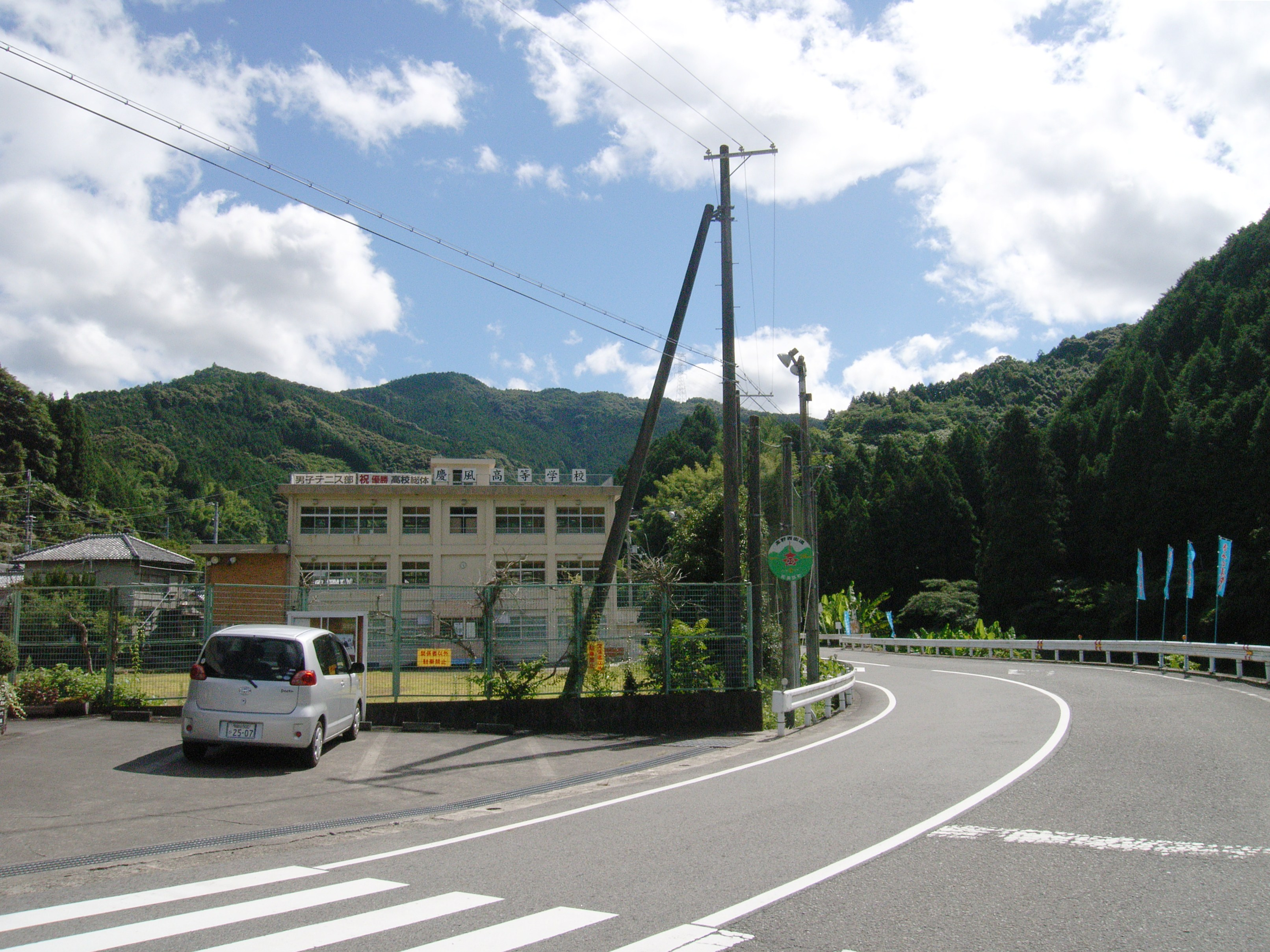 慶風高校